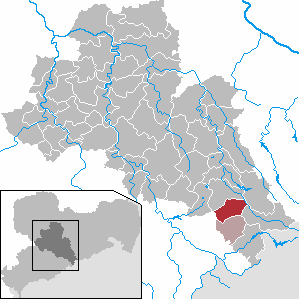 Dorfchemnitz in Saxony - district Mittelsachsen